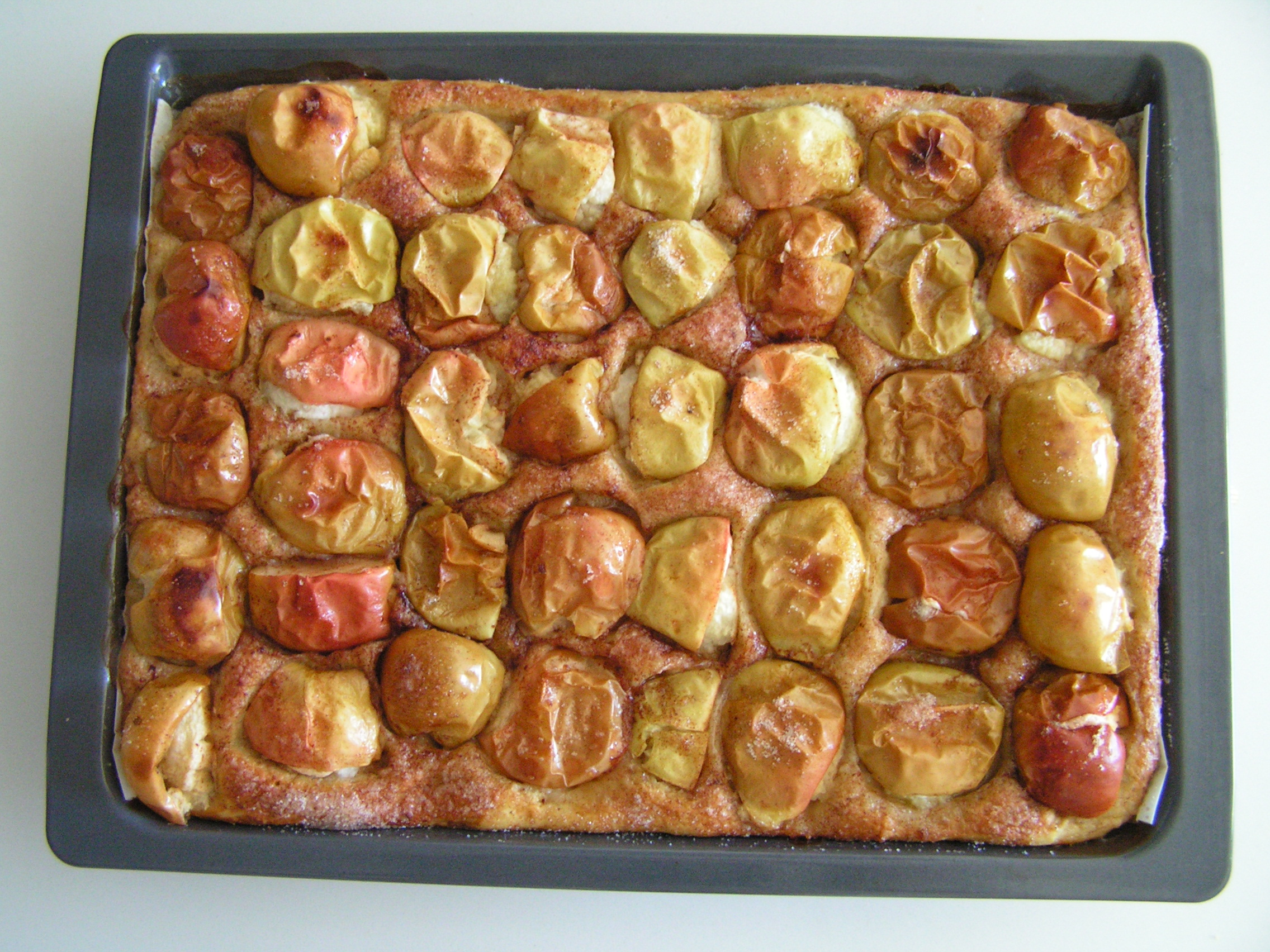 Tercer cóc de maçana que fem.